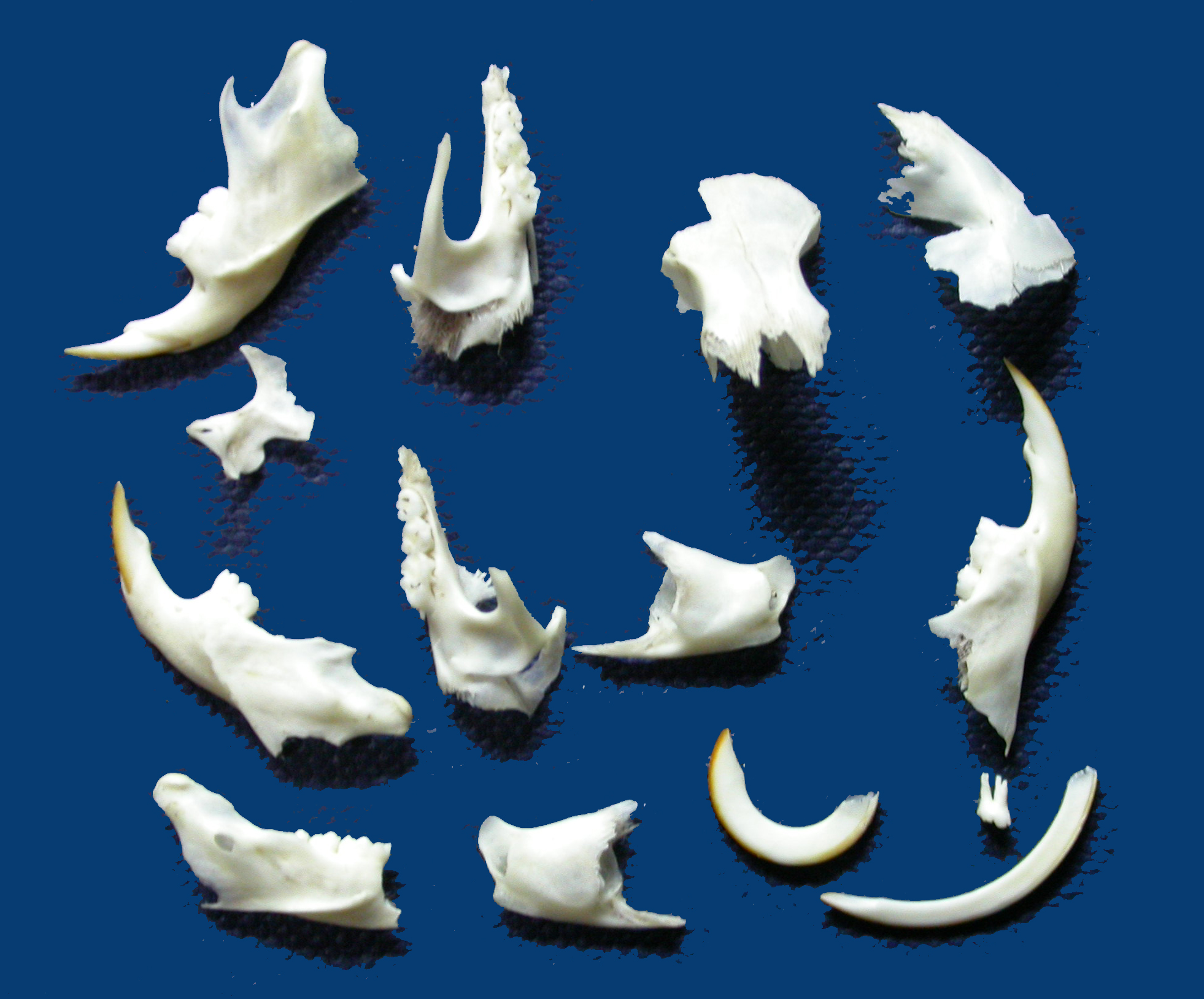 长耳鸮食团中的鼠类头骨，自己分离拍摄，本图片不允许百度百科使用